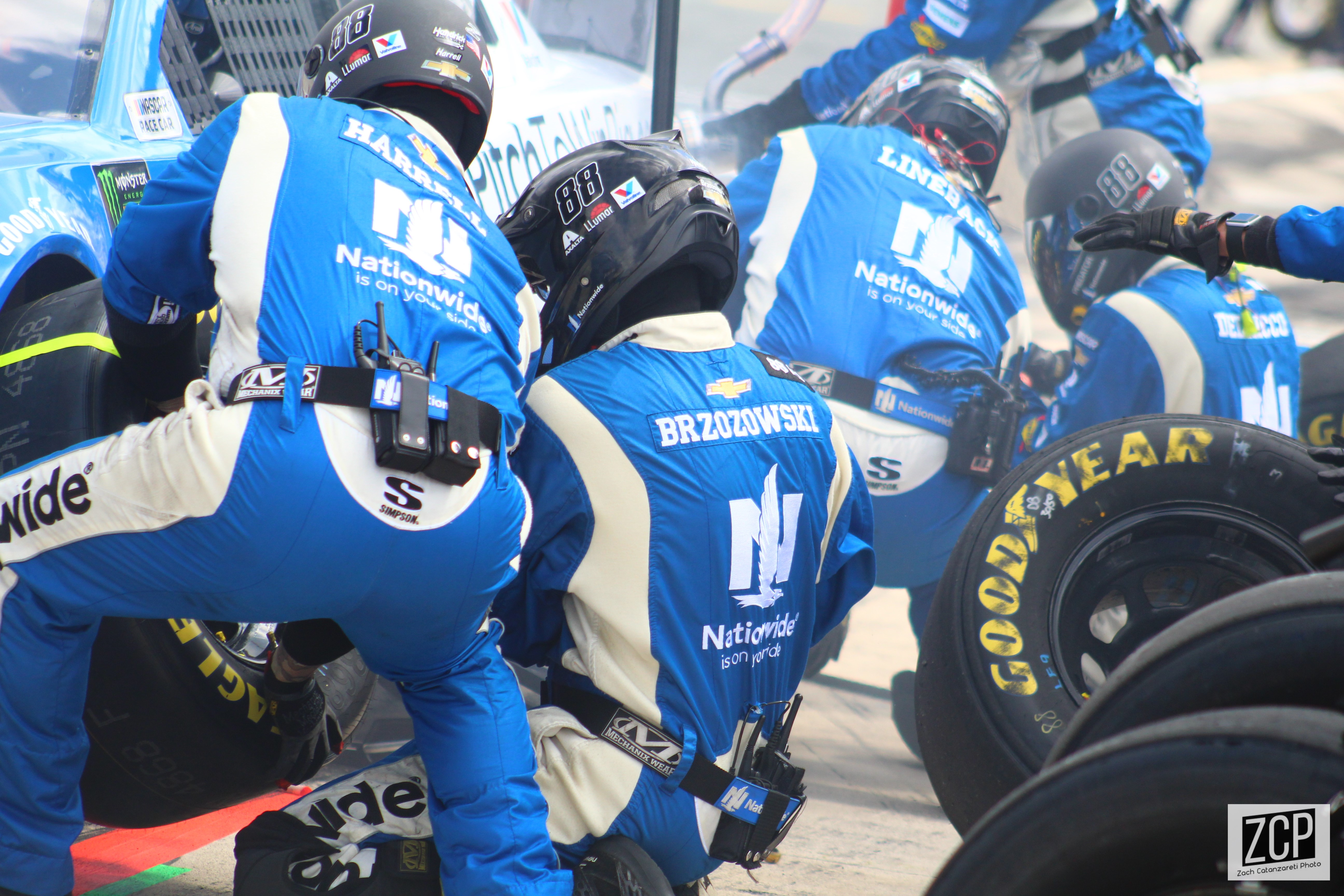 2019 Gander RV 400